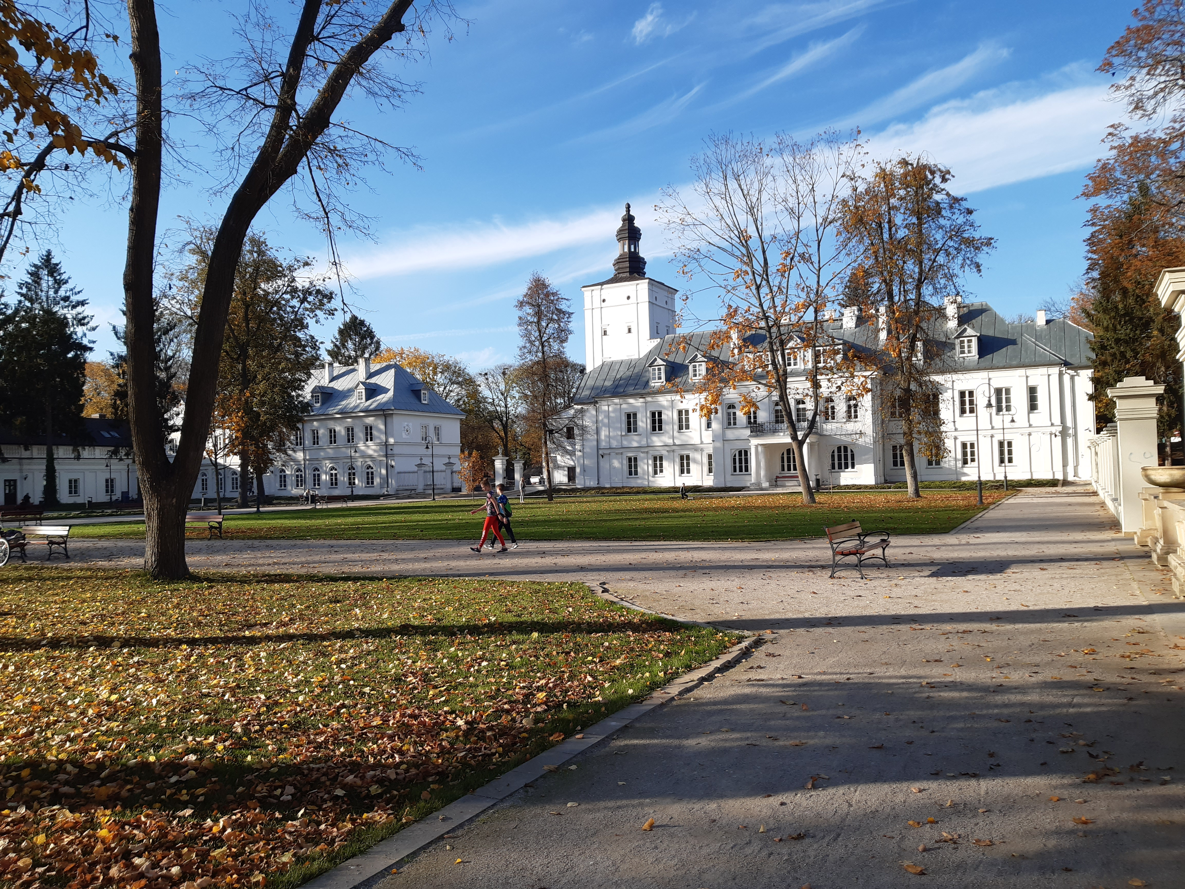 Widok skierowany na wieżę oraz oficyny północne.